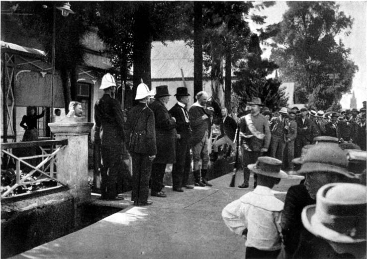 Paul Kruger addresses American Volunteers